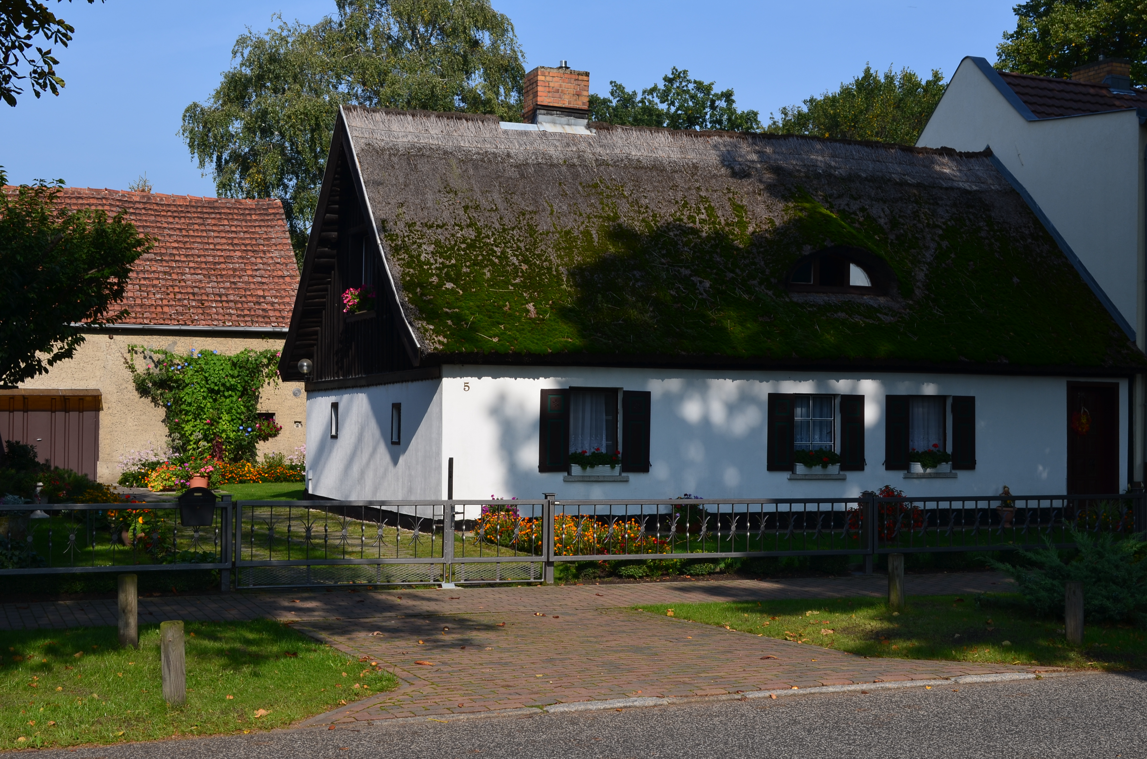 Altes Weberhaus in Philippsthal, Nuthetal